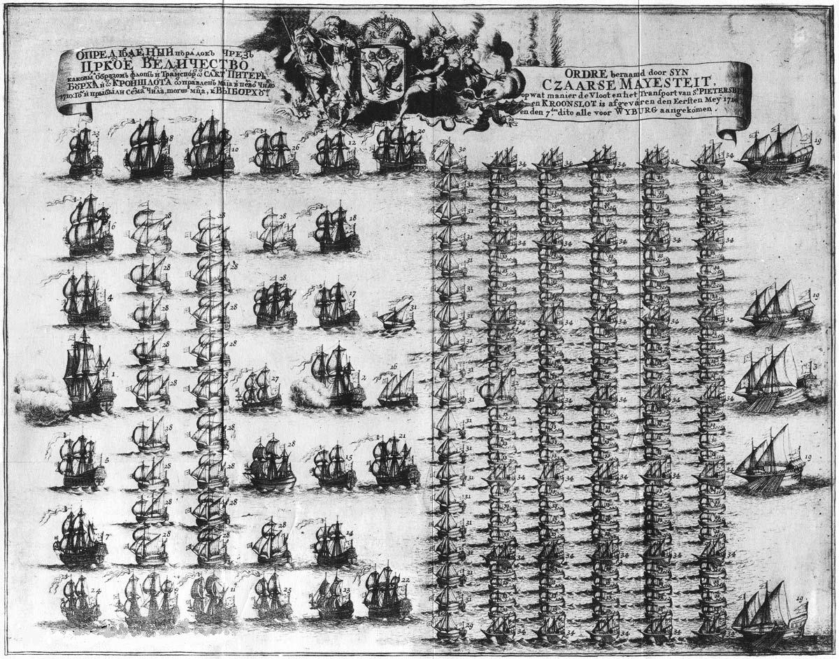 гравюра 1717 года, изображающая порядок построения Балтийского флота во время похода к Выборгу